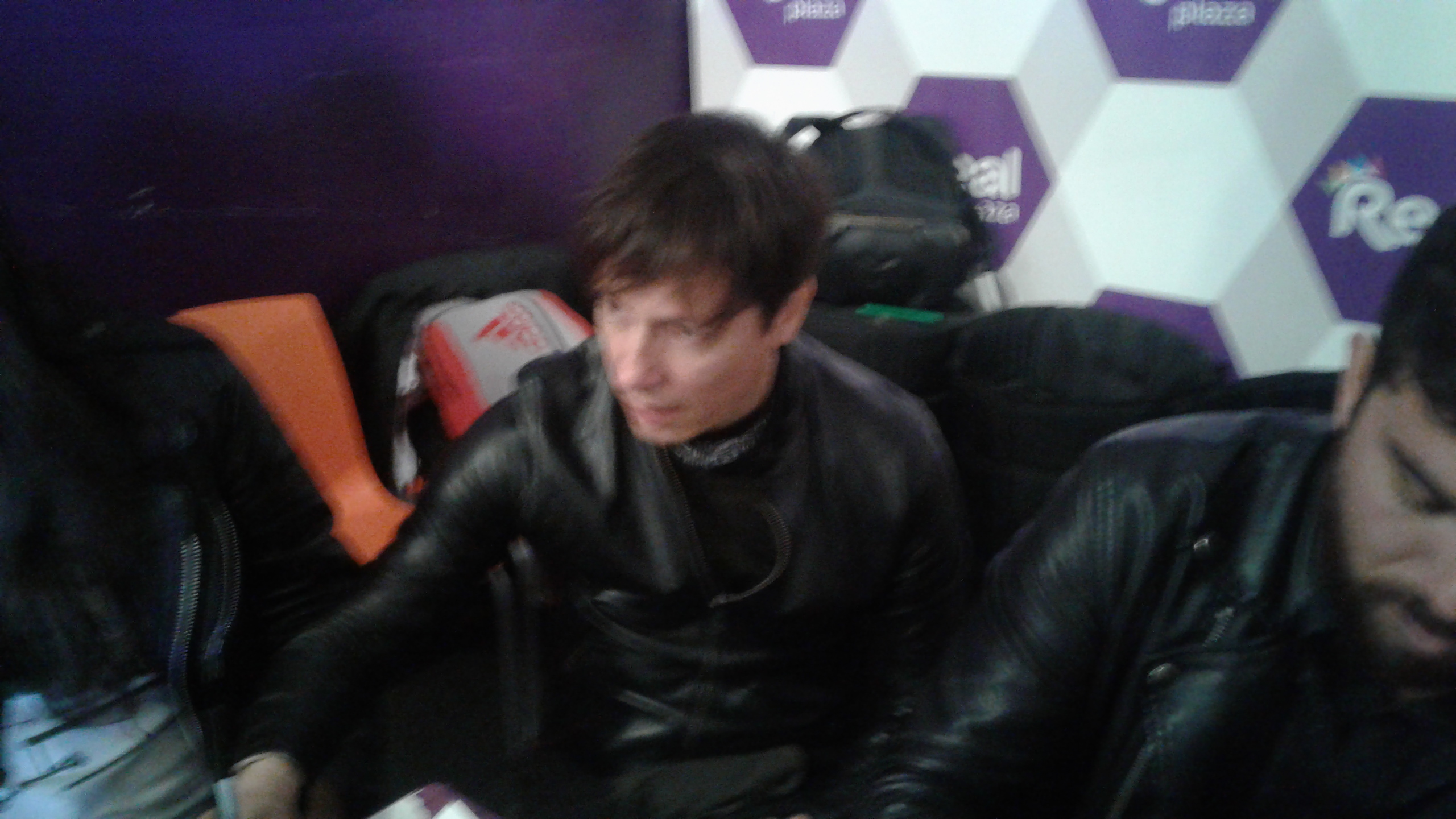 Salim Vera de Libido en una forma de autógrafos para el festival Día del Rock Peruano.